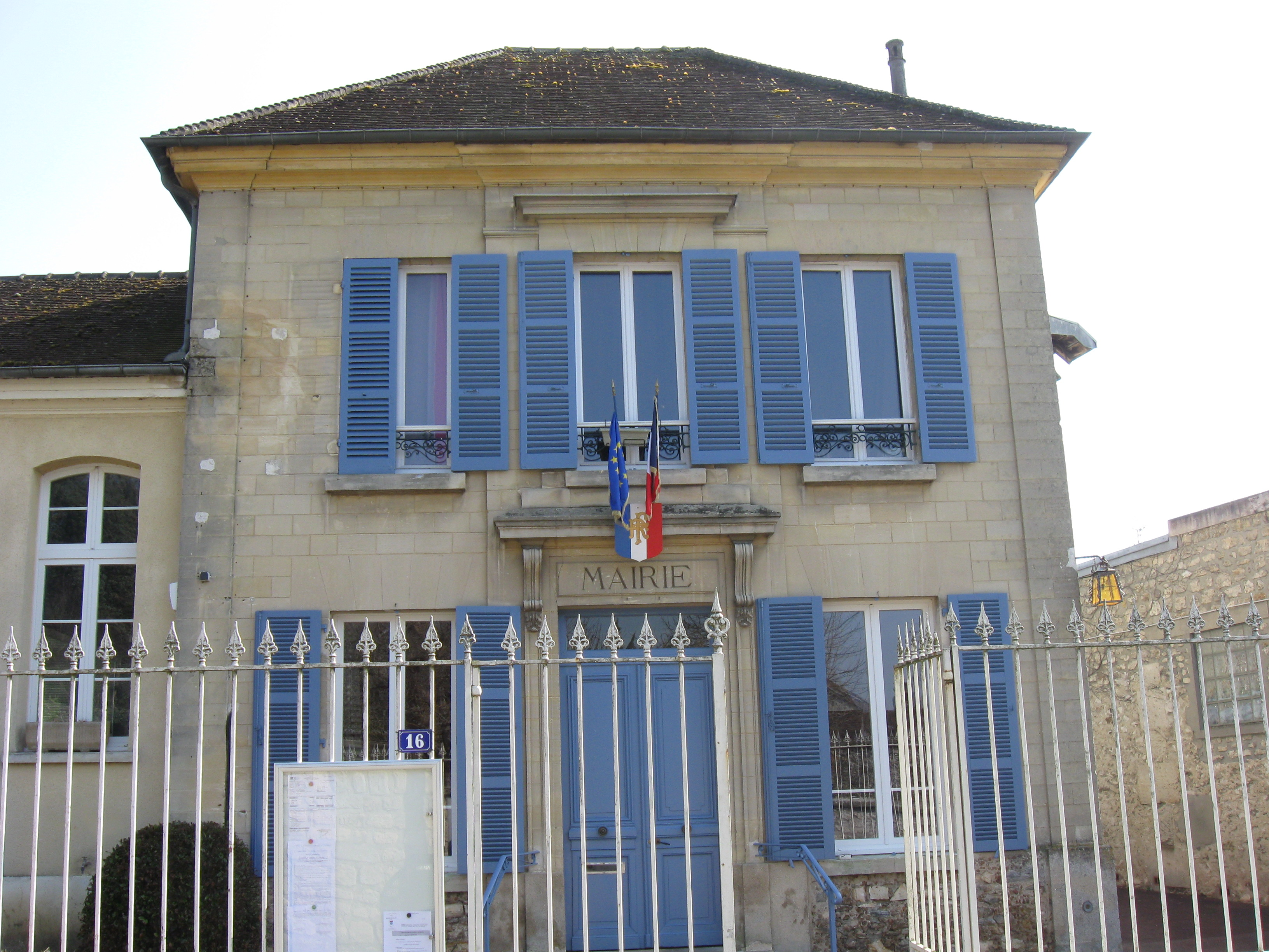 Mairie de Brignancourt (Val-d'Oise, région Île-de-France)